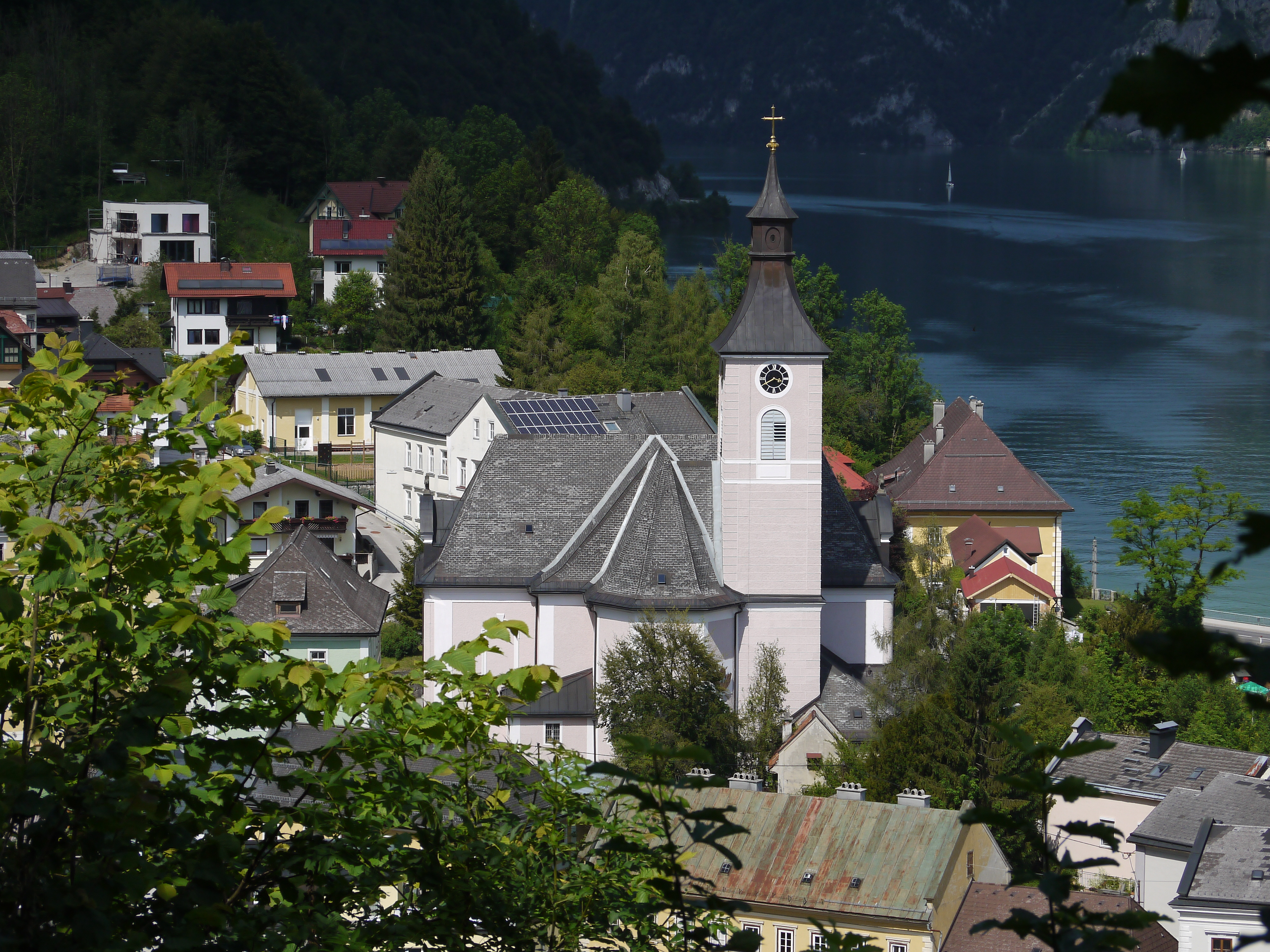 Kath. Pfarrkirche hl. Josef